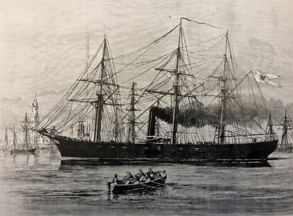 Glattdeckskorvette SMS Augusta, 1864 auf der Reede von Bremerhaven, zeitgenössischer Holzschnitt